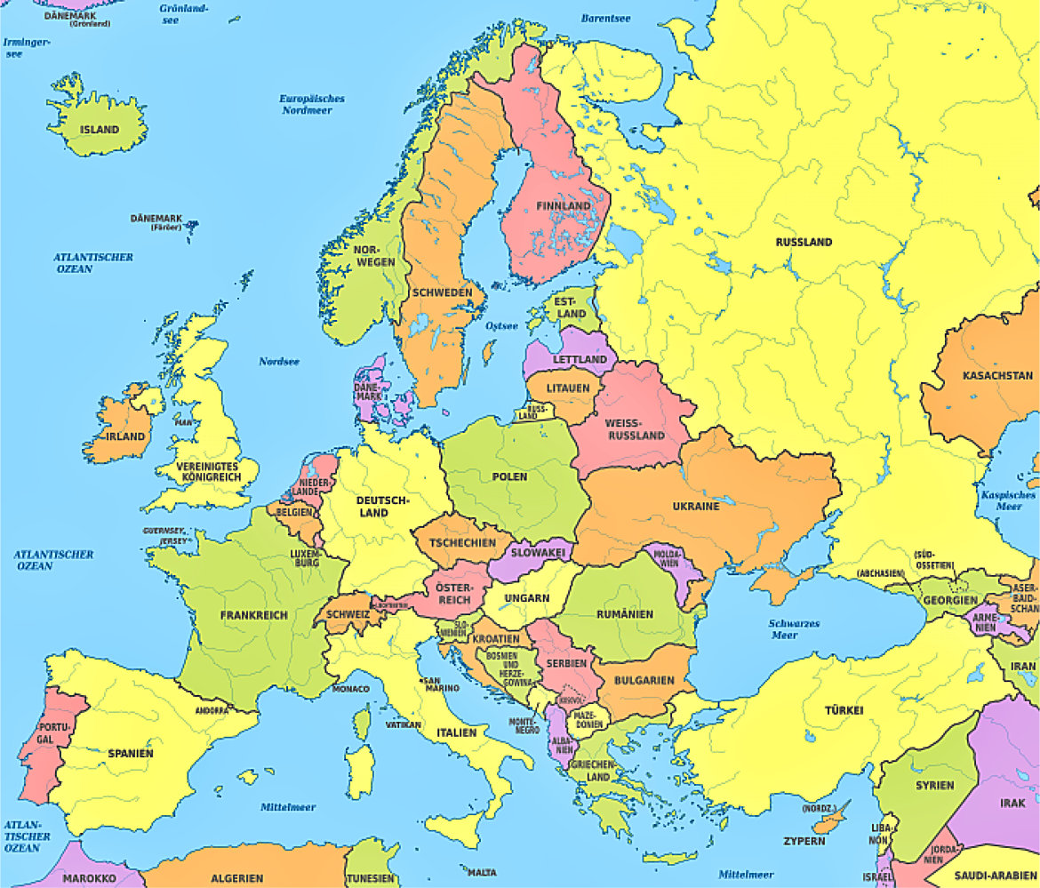 Boarisch: De heidign eiropäischn Schtotn.